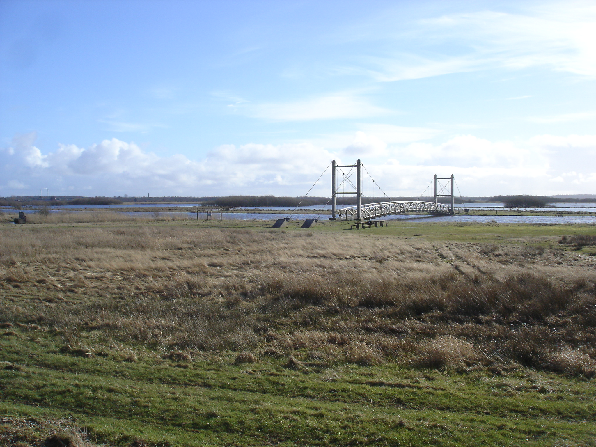 Kong Hans Bro over Skjern Å hvor Middelaldervejen gik